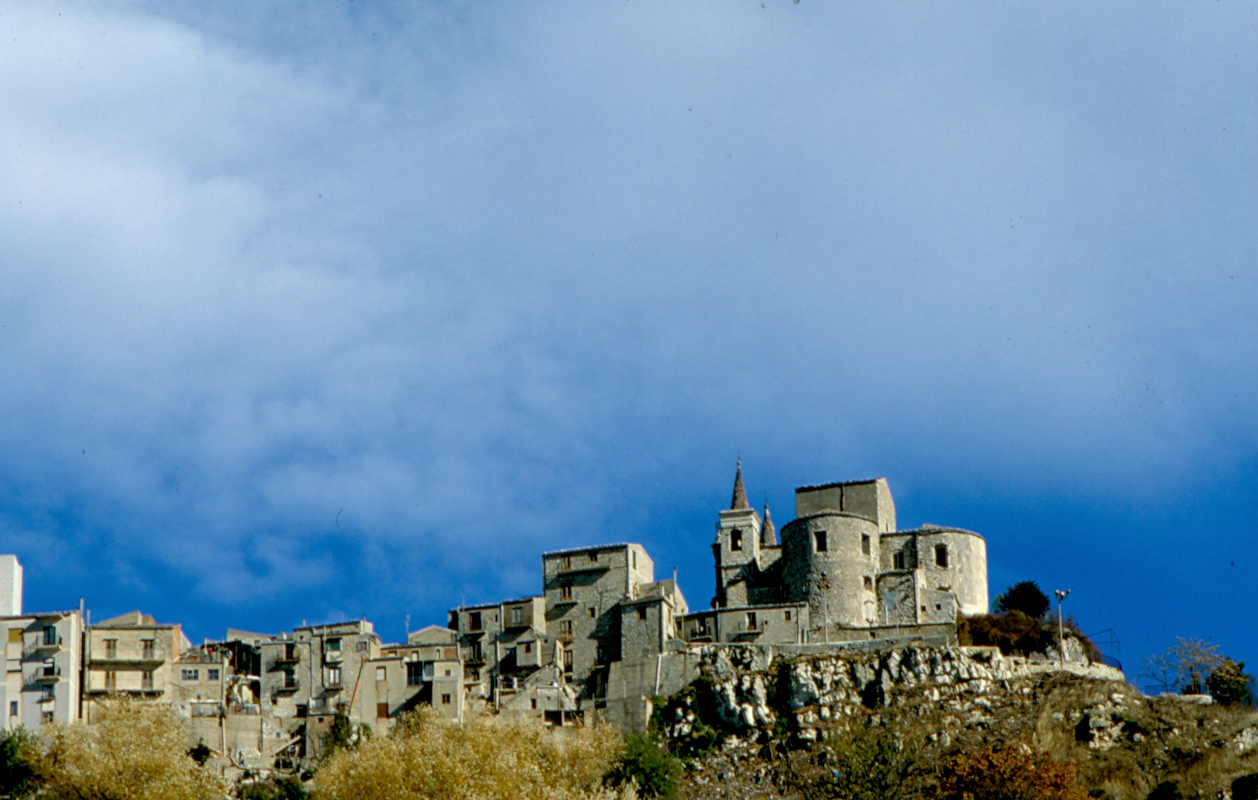 Petralia Soprana, Provincia di Palermo, Italy